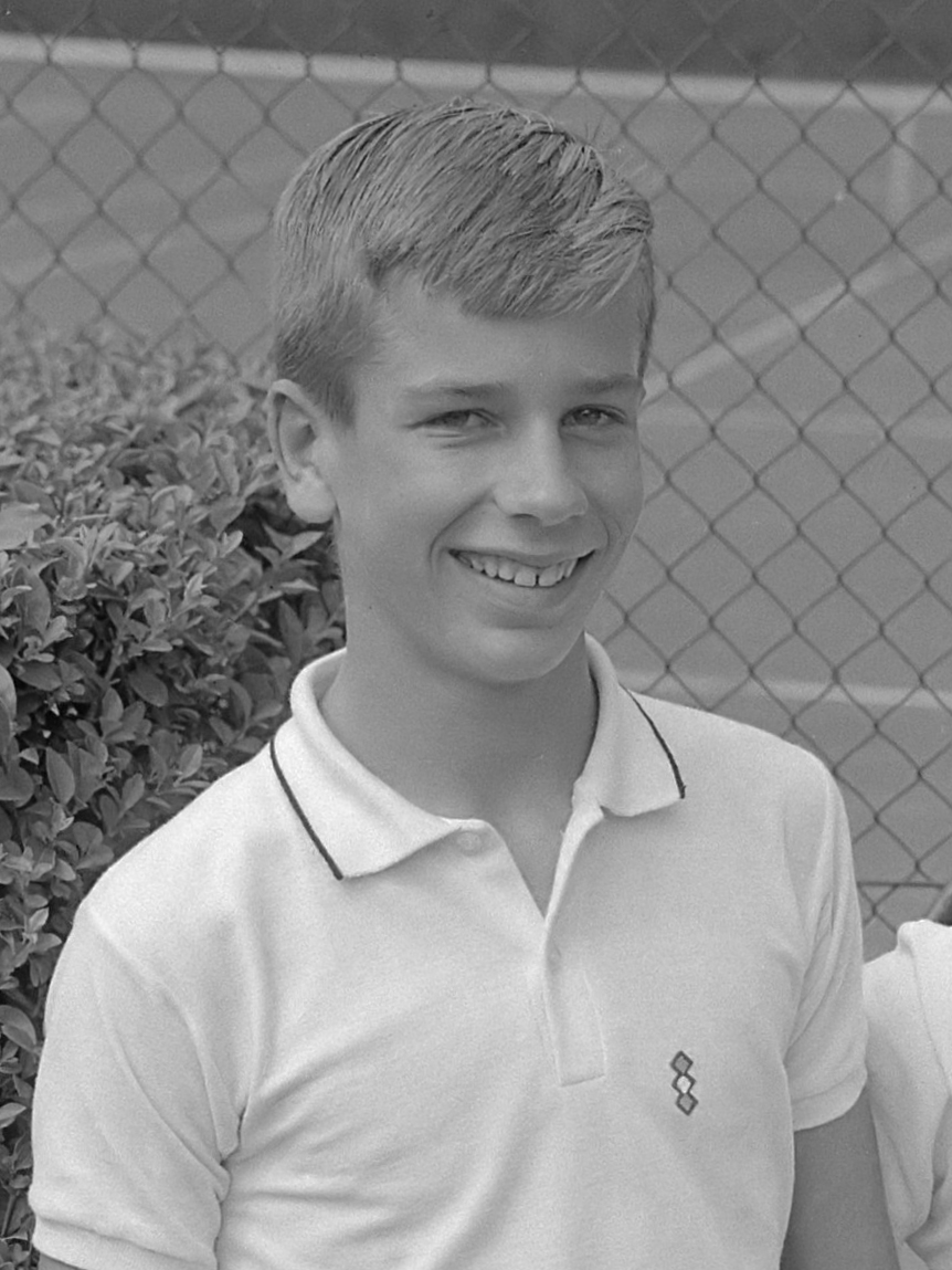 Internationale Nederlandse tenniskampioenschappen 1964 te Hilversum, Erik Dillen (VS) jongste deelnemer met tegenstander Van de Ruijn (r)` 20 juli 1964